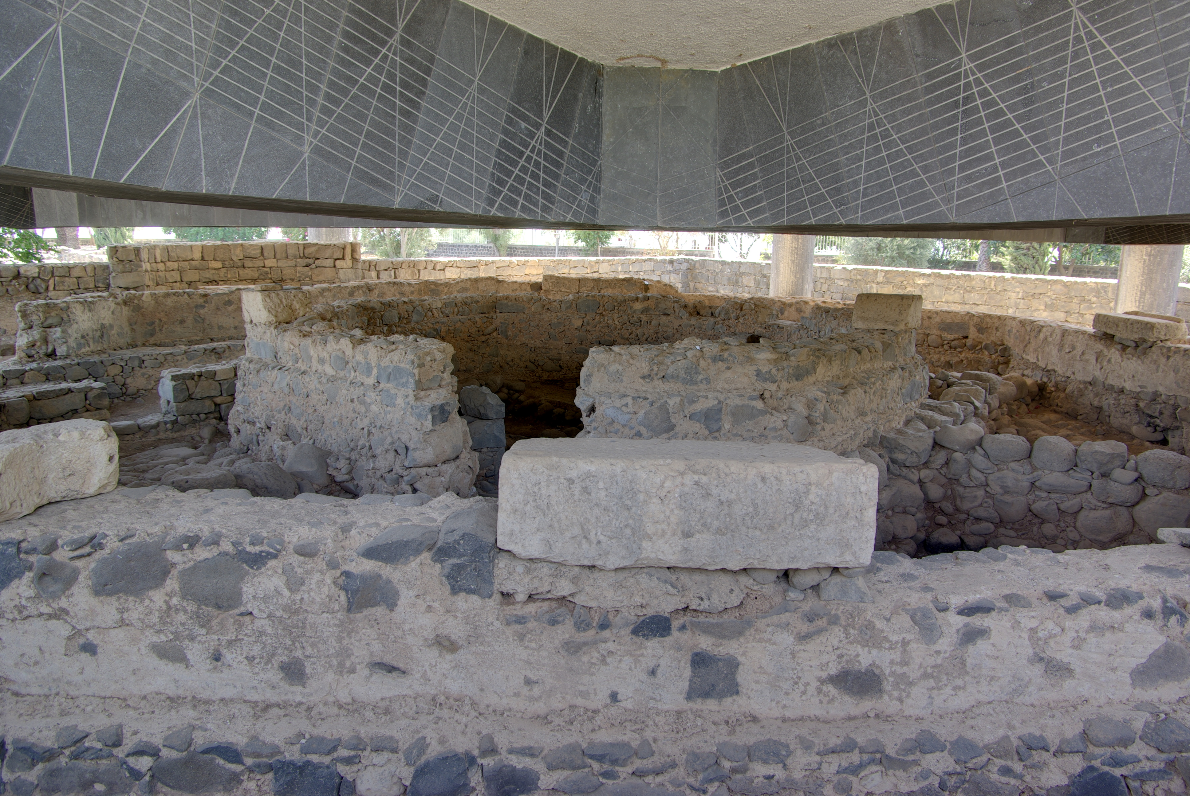 Das Haus des Petrus unter der modernen Kirche